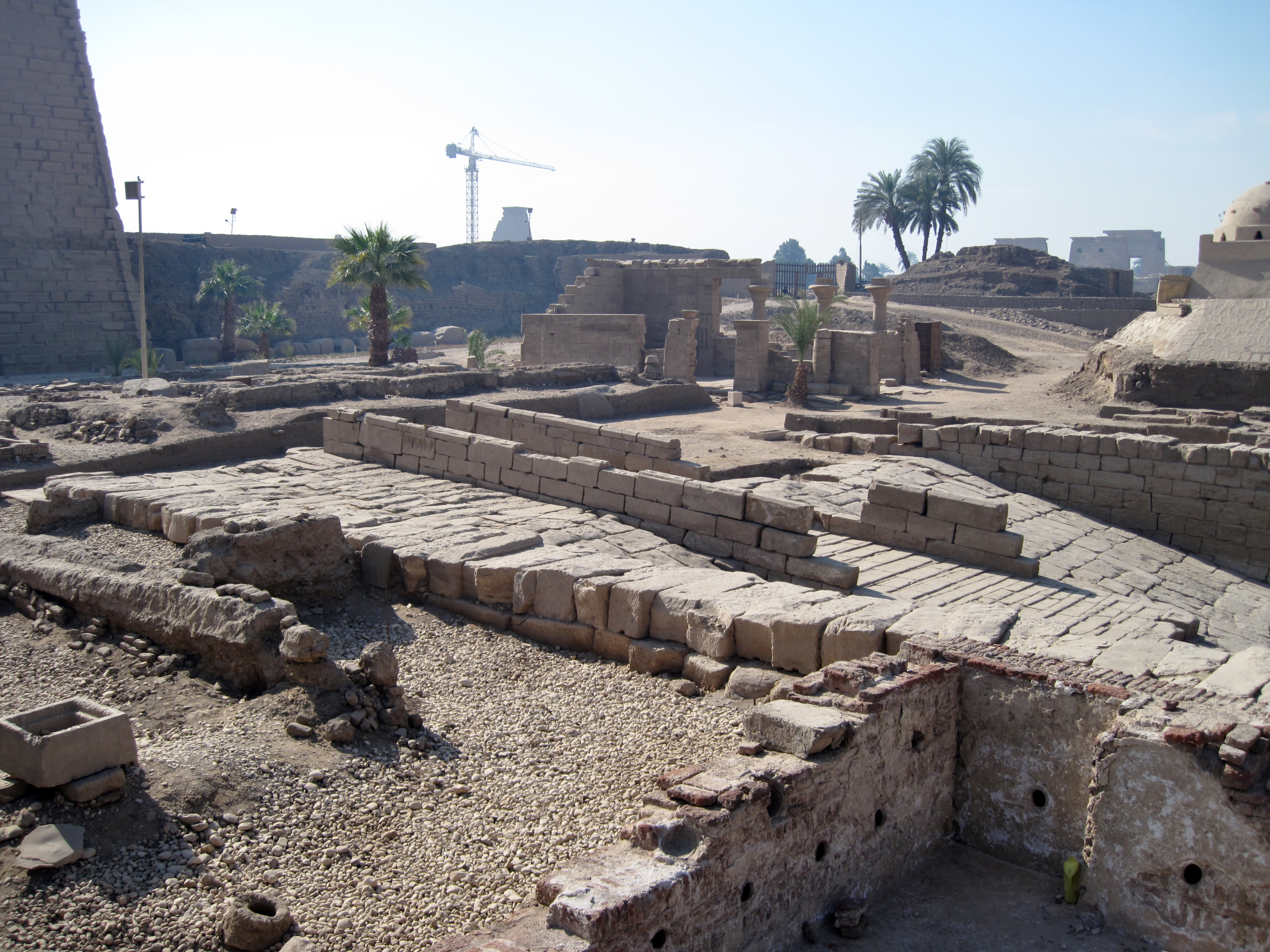 Ehemalige Anlegestelle vor dem Tempel von Karnak, nördlich von Luxor, Ägypten